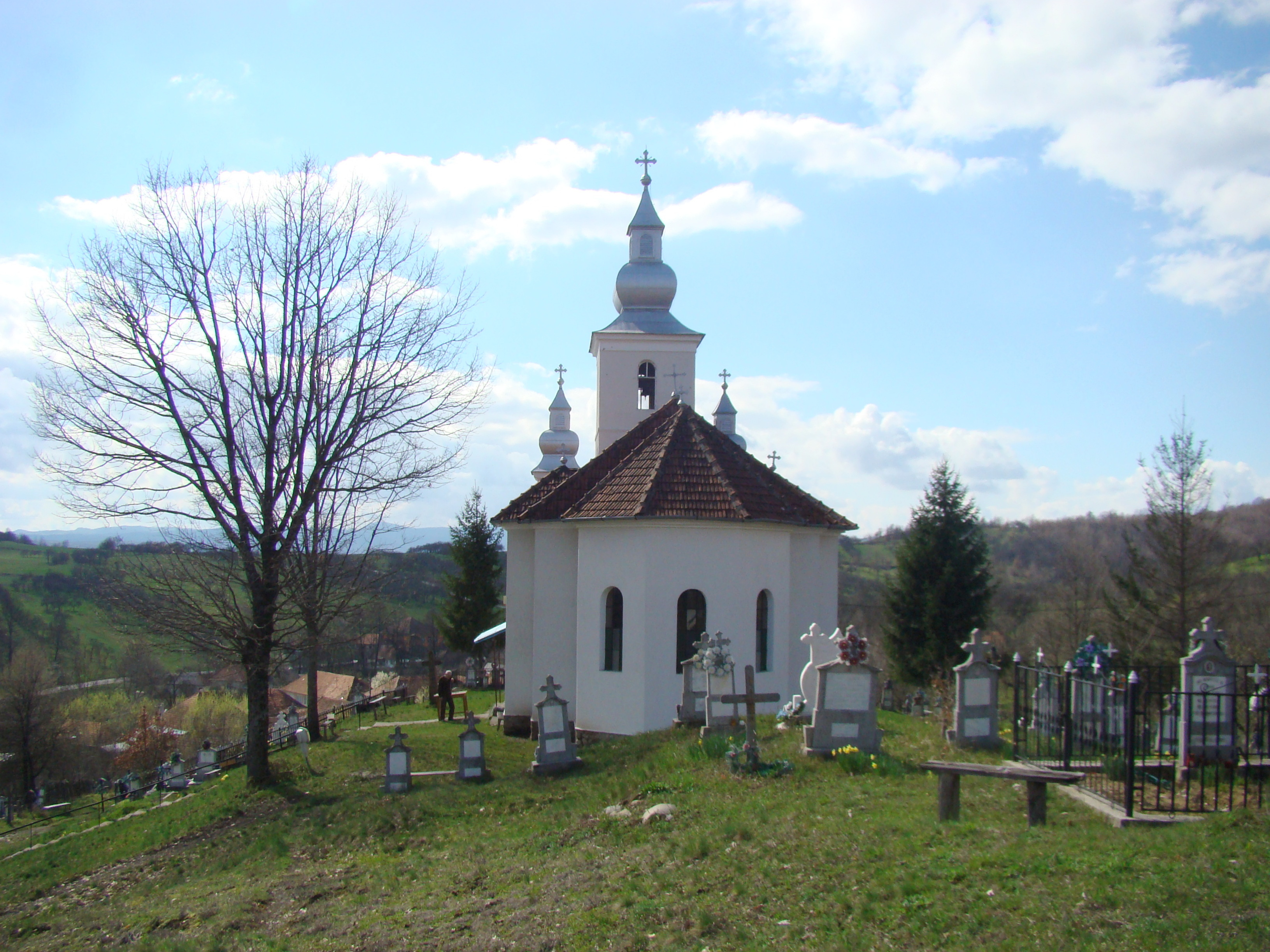 Biserica „Sfântul Ierarh Nicolae”, sat OBÂRŞA; comuna TOMEŞTI